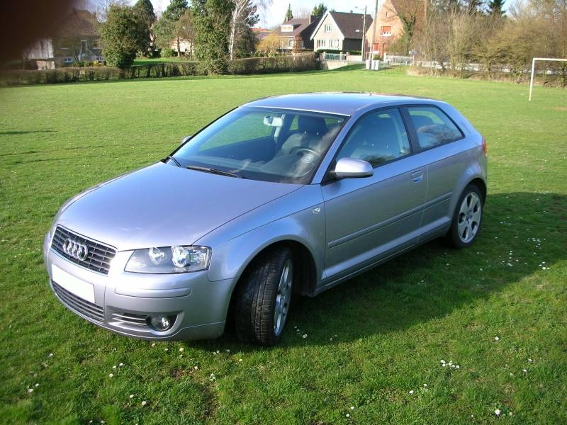 audi a3 2004